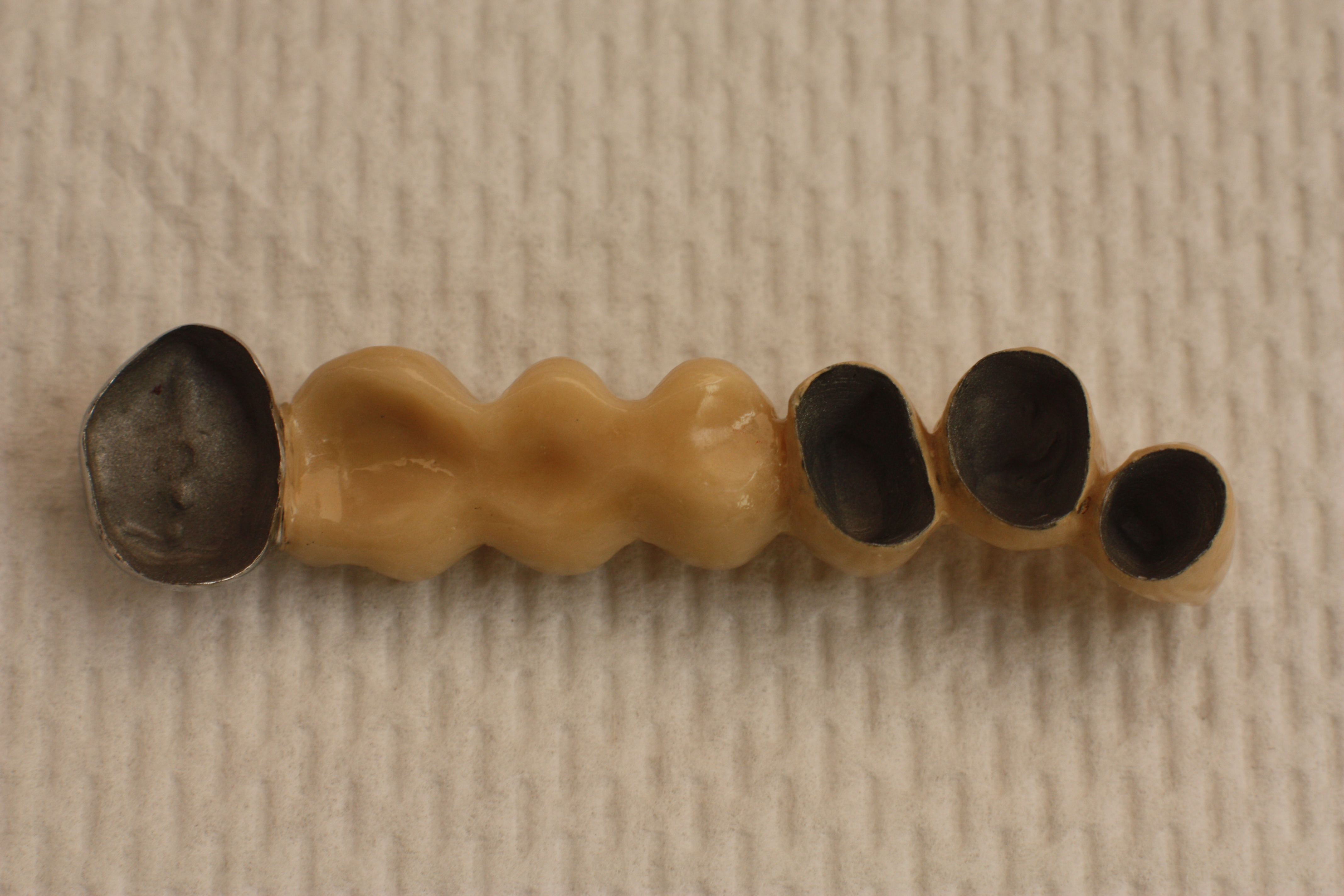 VMK-Brücke, linker Oberkiefer, 7-gliedrig